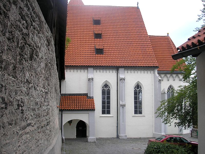 St. Blasius Kaufbeuren (Bayerisch-Schwaben). Stadtmauer und Kirche / St. Blasius Kaufbeuren (Bavaria, Germany). City wall and church. Eigene Aufnahme, Aug. 2006 / Own photo, Aug. 2006